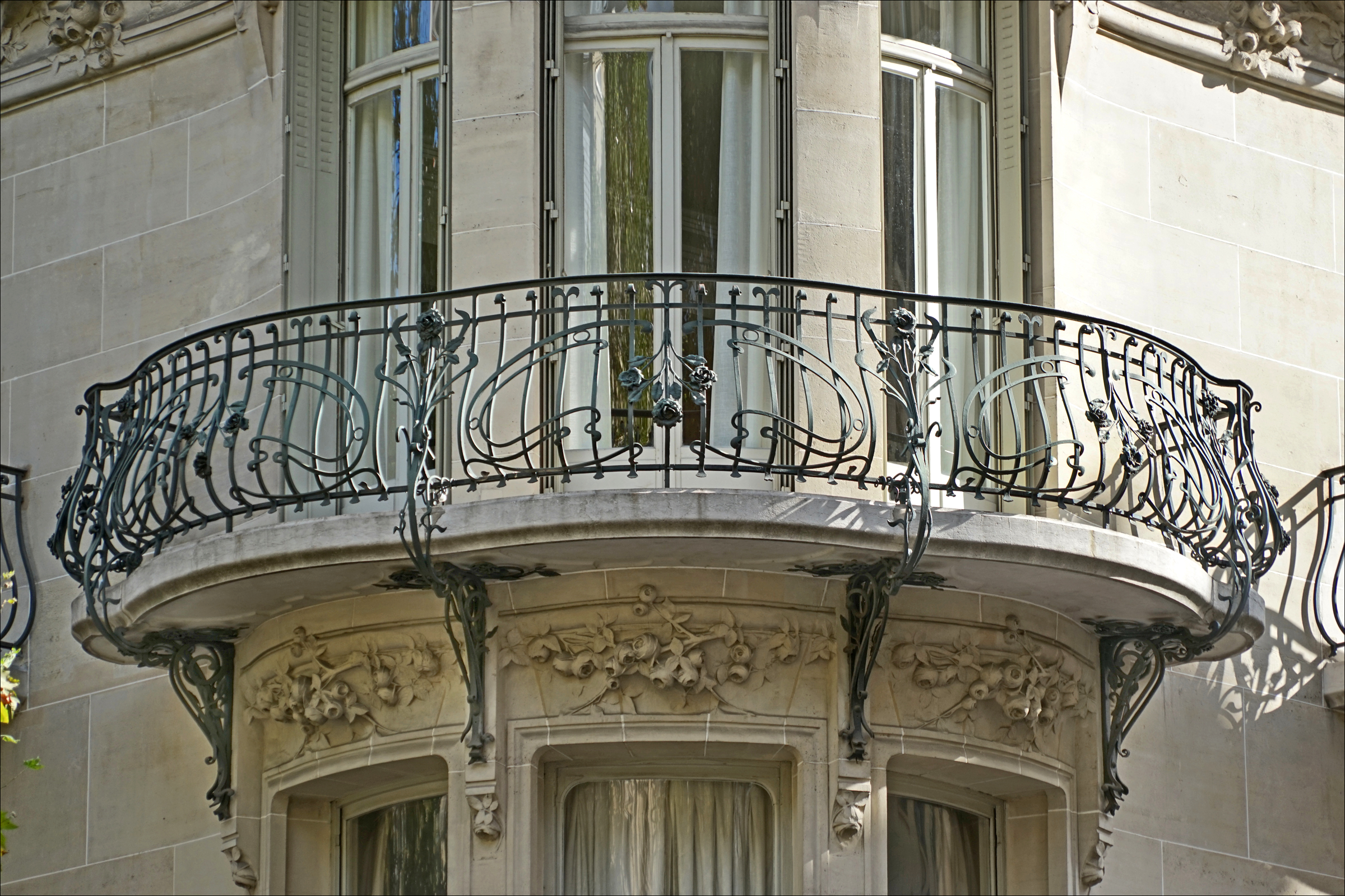 Balcon d'angle de l'immeuble de l'architecte Jules Lavirotte au 23 avenue de Messine à Paris Immeuble terminé en 1907 dans le style art nouveau. À l'origine, l'immeuble ne comptait que 2 étages, il a été surélevé par la suite et une tourelle d'angle a été ajoutée. Architecte Jules Lavirotte Ferronneries d'Auguste Dondelinger (1876-1940) Sculptures de Léon Binet Site sur l'art nouveau à Paris